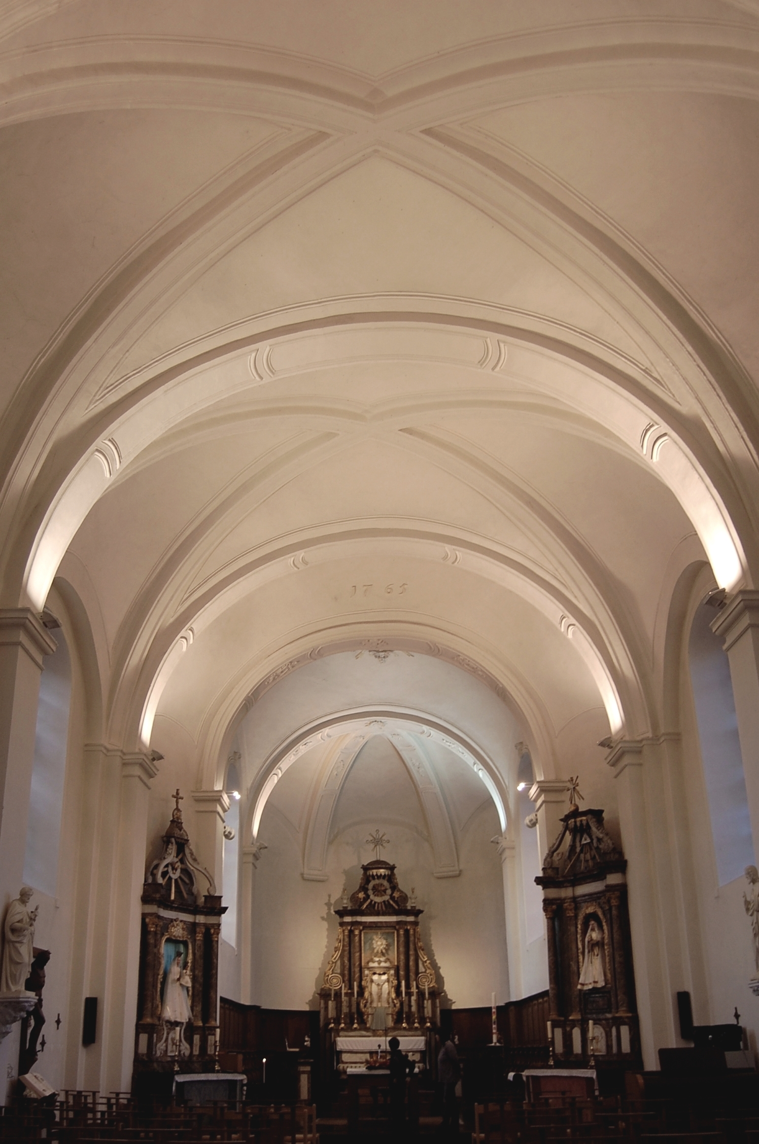 Intérieur de l'église Notre-Dame de la Nativité